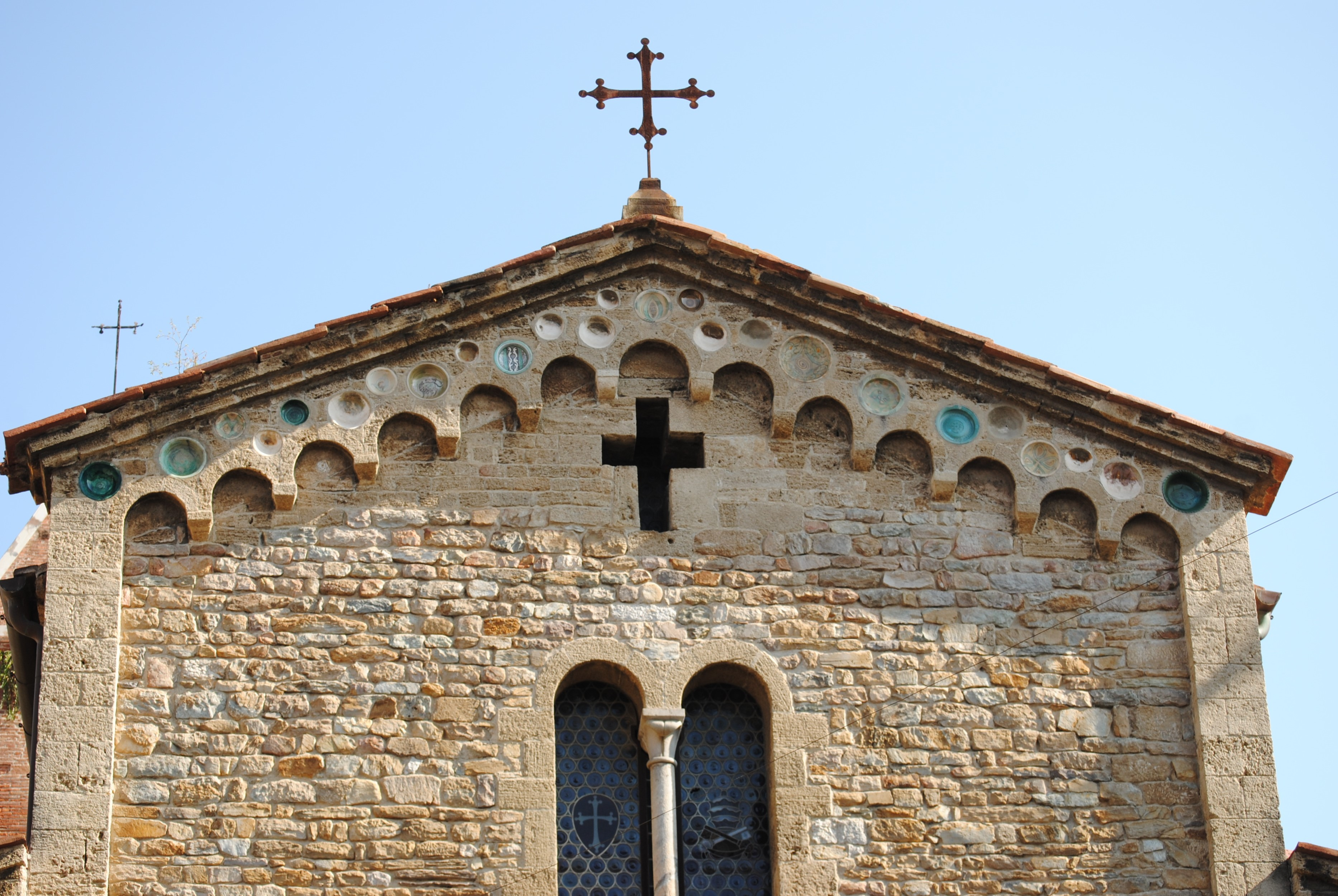 Facciata della chiesa di San Sisto (Pisa), navata centrale. I bacini ceramici di importazione sono posti tra gli spioventi del tetto e gli archi ciechi a tutto sesto. I pezzi originali sono stati rimossi per essere conservati a fini conservativi presso il Museo nazionale di San Matteo.